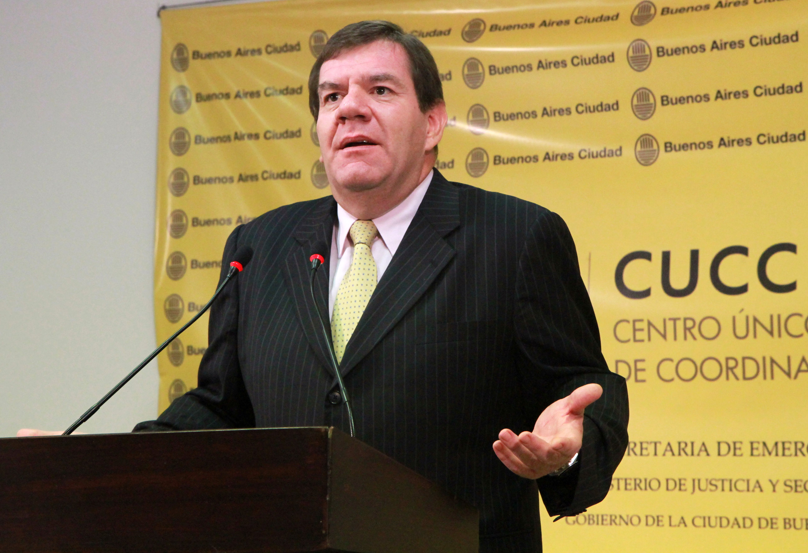 Buenos Aires, 1° de febrero de 2012 - El jefe de Gobierno de la Ciudad de Buenos Aires, Mauricio Macri, encabezó hoy, en el Centro Único de Coordinación y Control, la reunión semanal de Gabinete, a cuyo término la vicejefa de Gobierno, María Eugenia Vidal, y el ministro de Justicia y Seguridad, Guillermo Montenegro, dialogaron con el periodismo. Foto: Sandra Hernández/GCBA